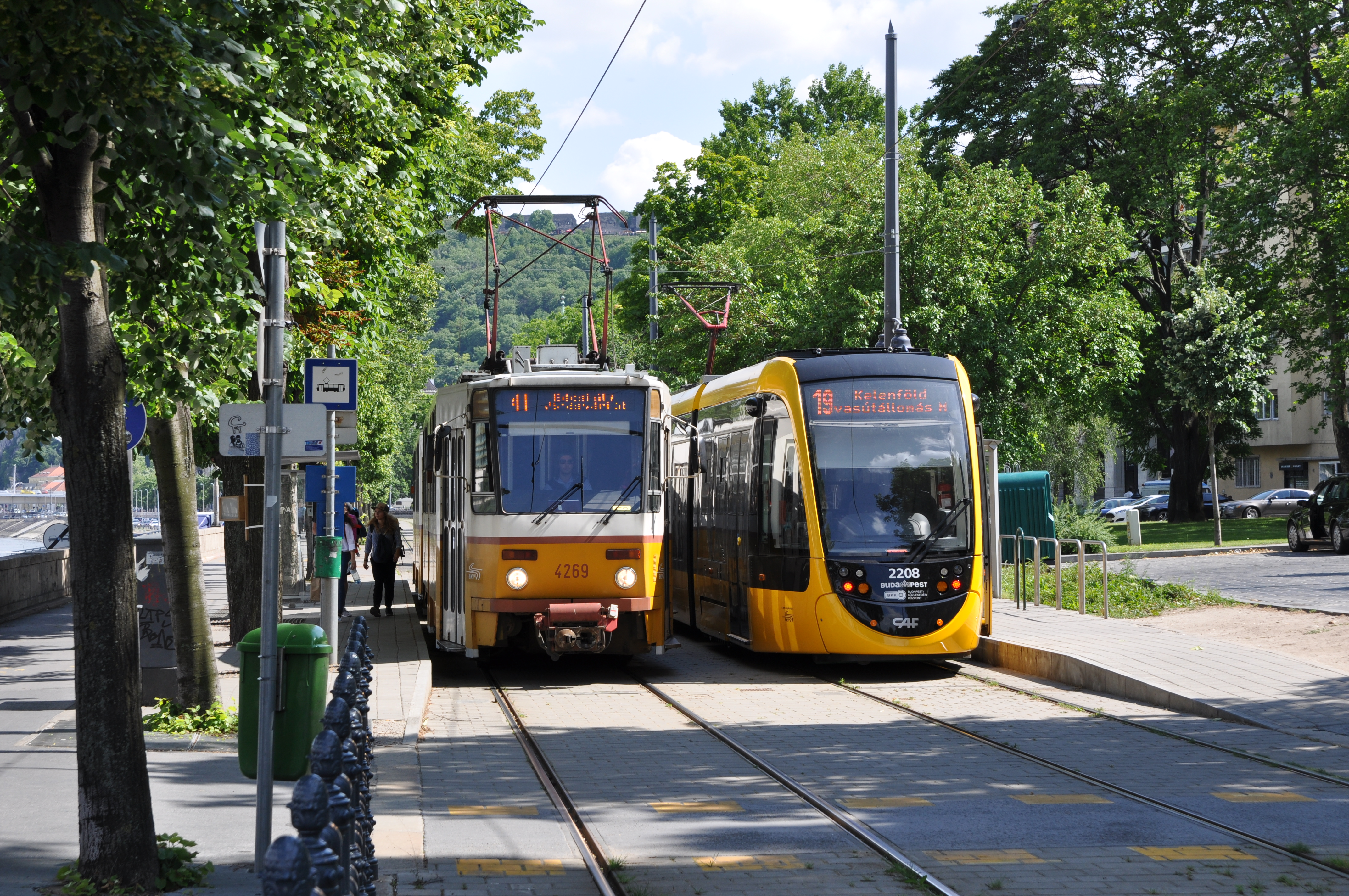 Budapest, Clark Ádám tér, Tatra T5C5k2 és CAF Urbos 3